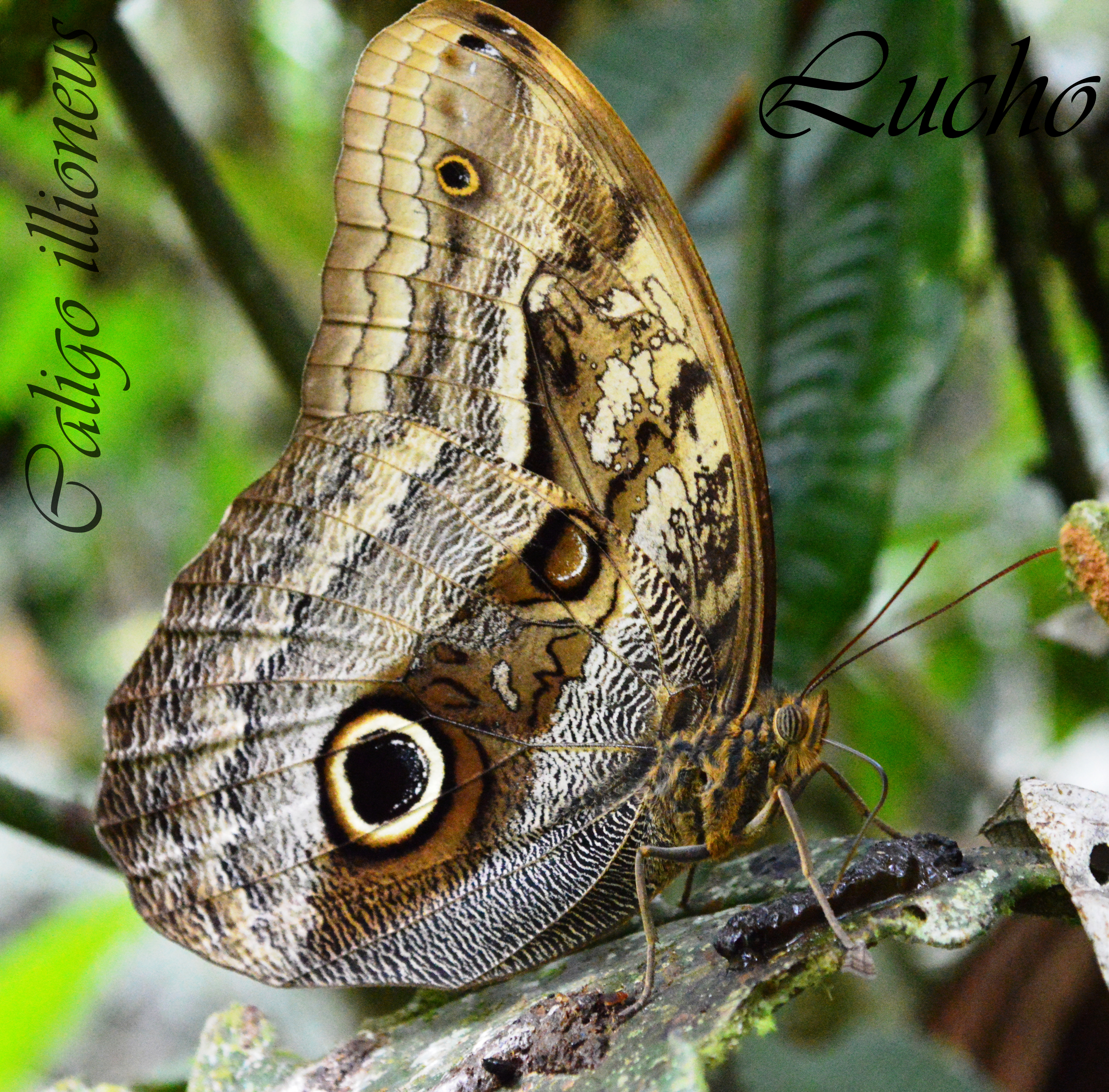 Esta especie de lepidóptero es muy translucido, y bello, la foto se desarrollo en Alejandria, Antioquia.